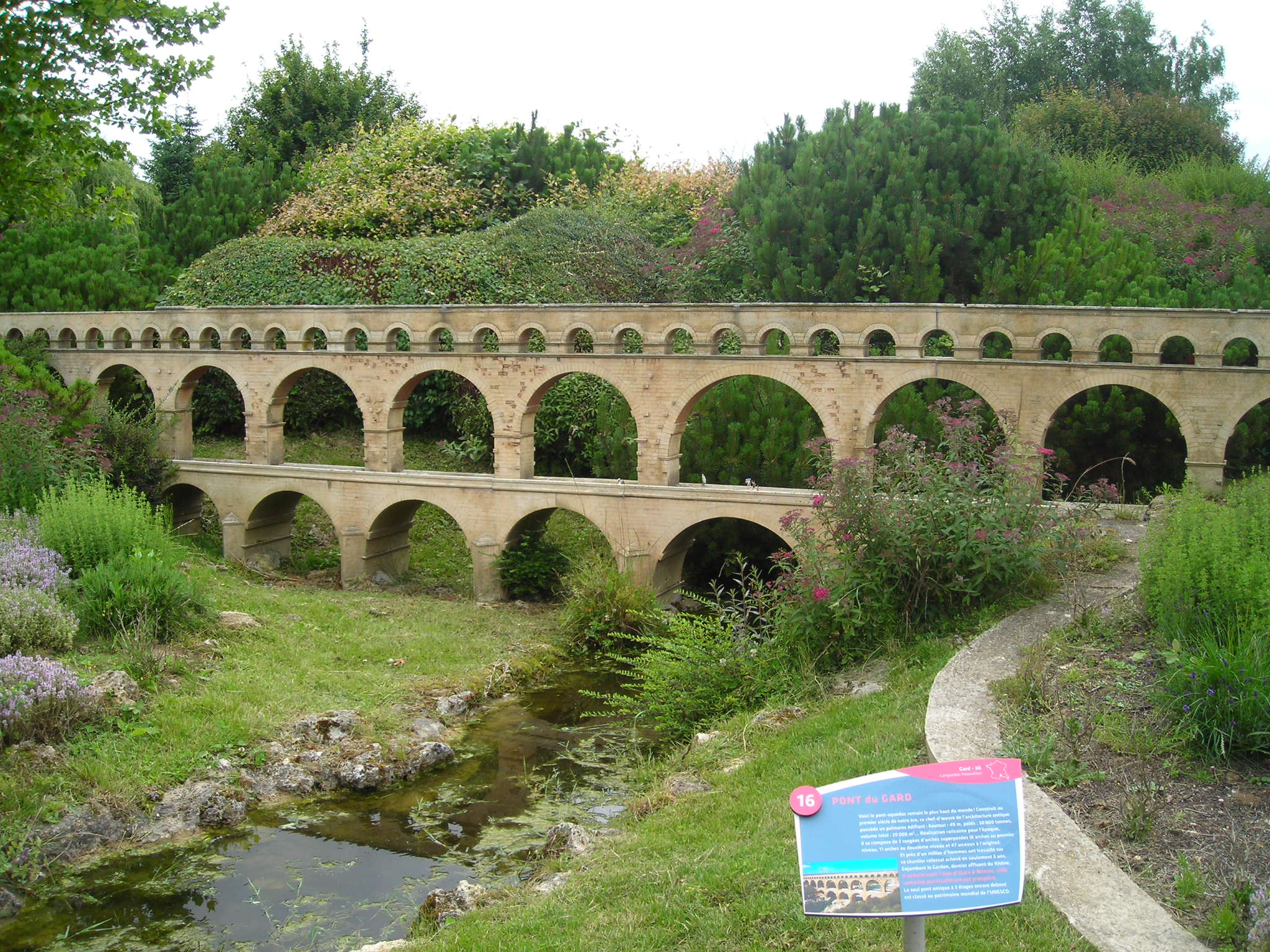 Maquette du pont du Gard à France Miniature (Élancourt)